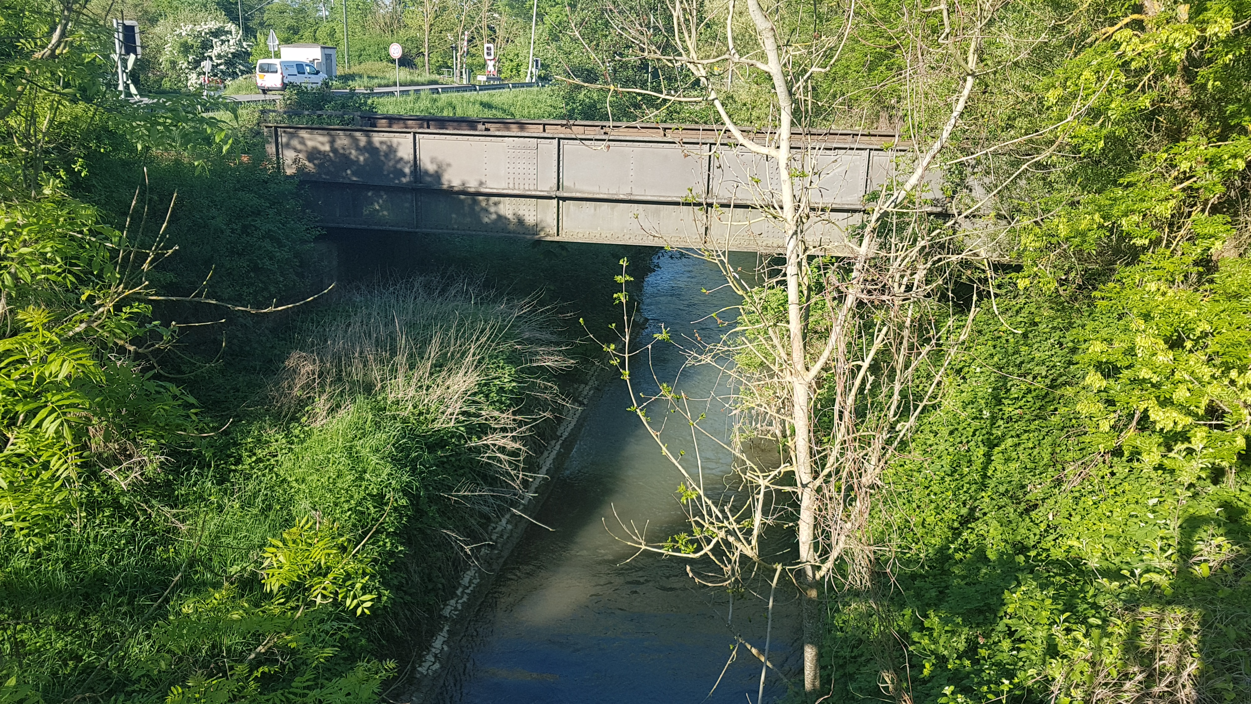 2018-05-07 Die Umpfer bei Königshofen in der Nähe der Bahngleise kurz vor ihrer Mündung in die Tauber